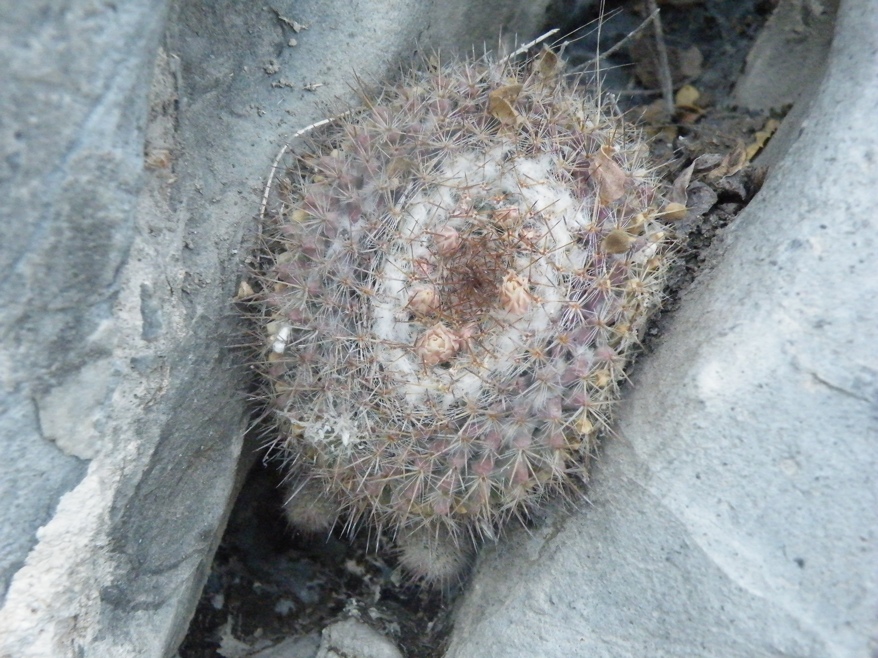 Huasteca Canyon, Nuevo Leon